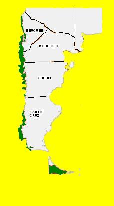 Patagonia Verde Argentina.